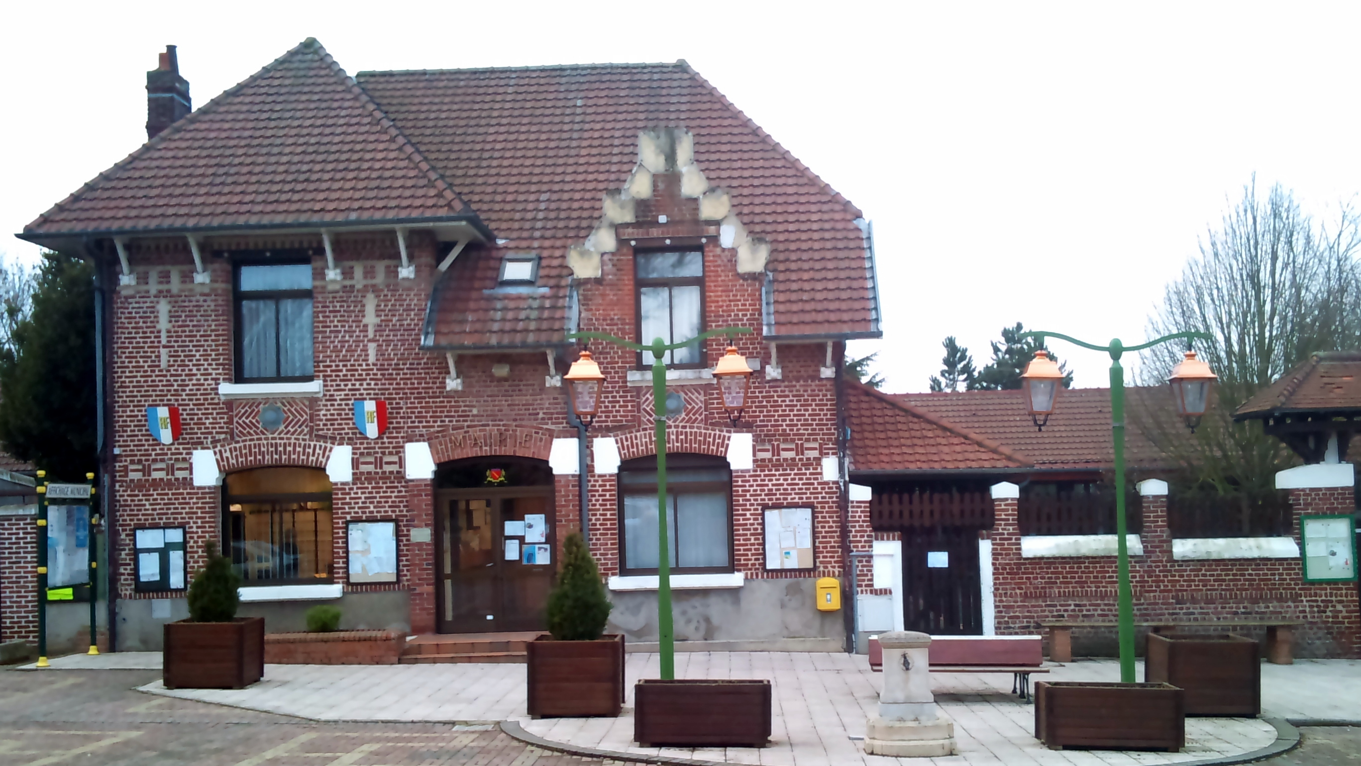 Mairie de Bois-Bernard